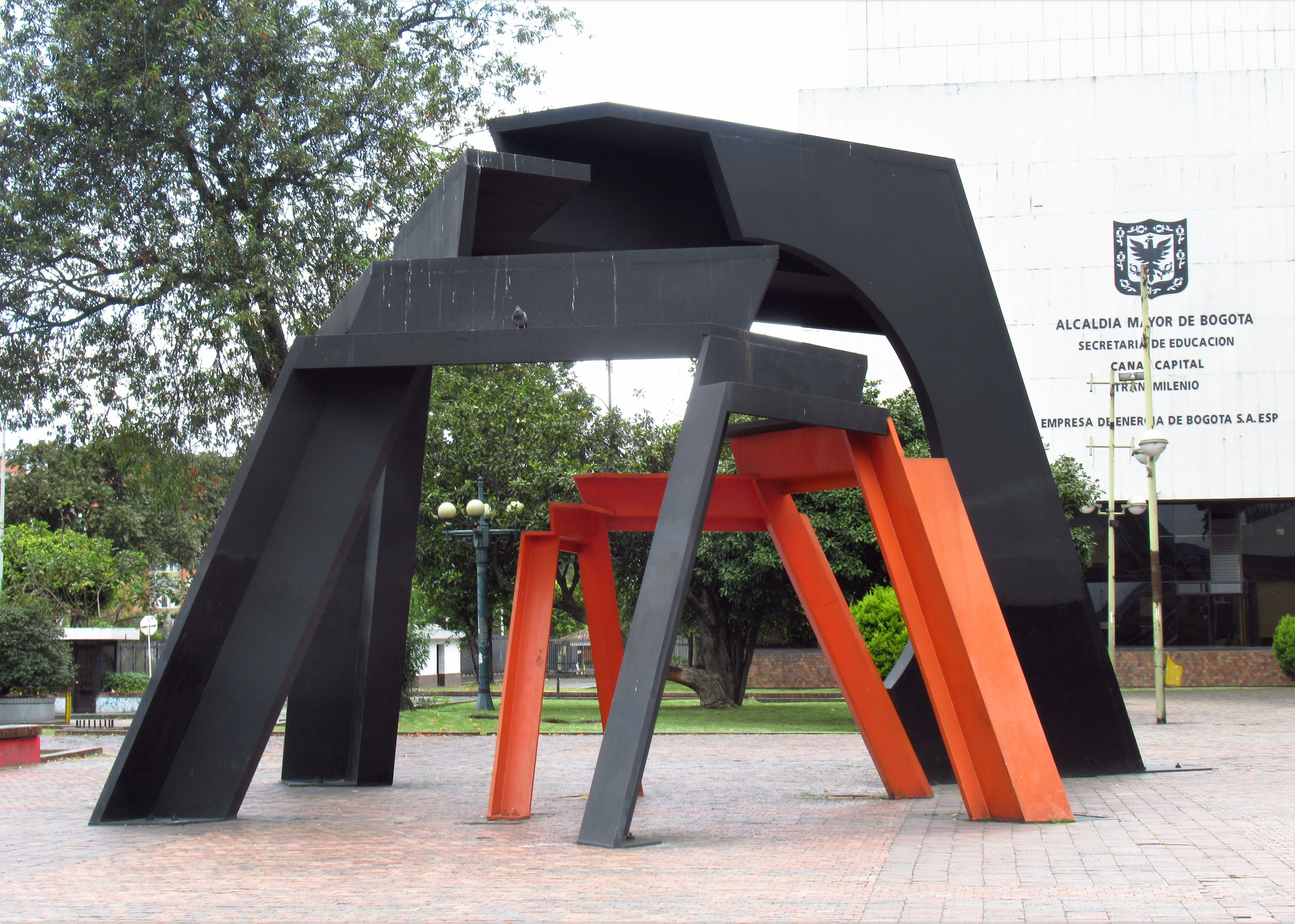 Caracol en crecimiento ilimitado, escultura de Eduardo Ramírez Vilamizar. Bogotá, avenida El Dorado.